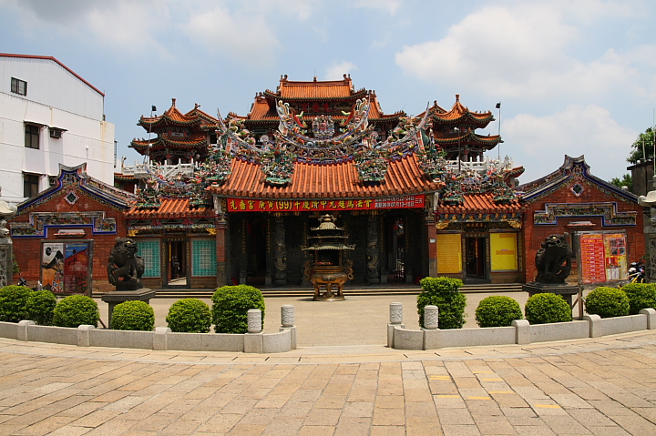 先嗇宮。